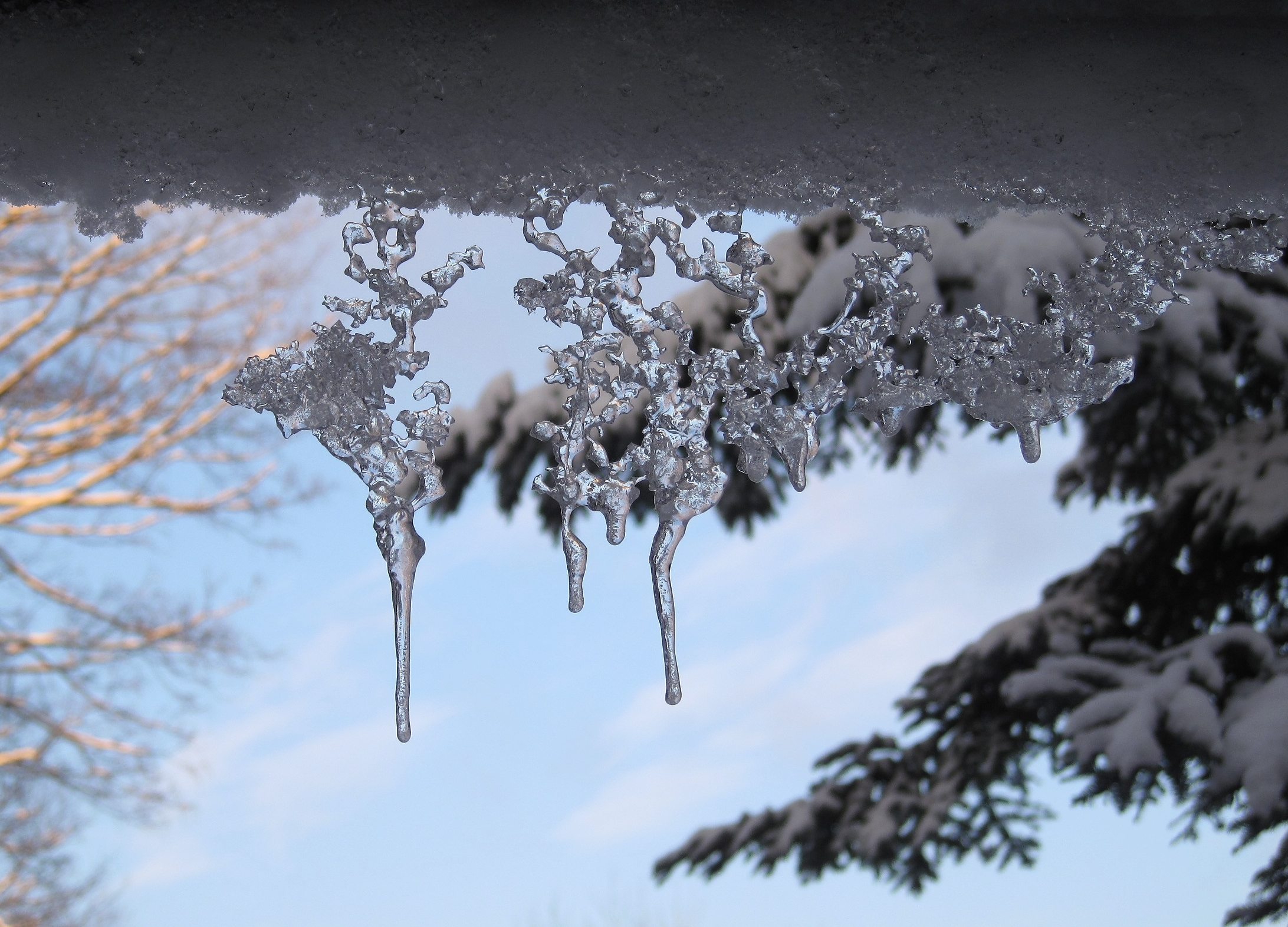 Klareis mit Spiegelungen. Durch Frost erstarrtes (gefrorenes), zuvor vermutlich aufgrund von Schnee getautes, Wasser.